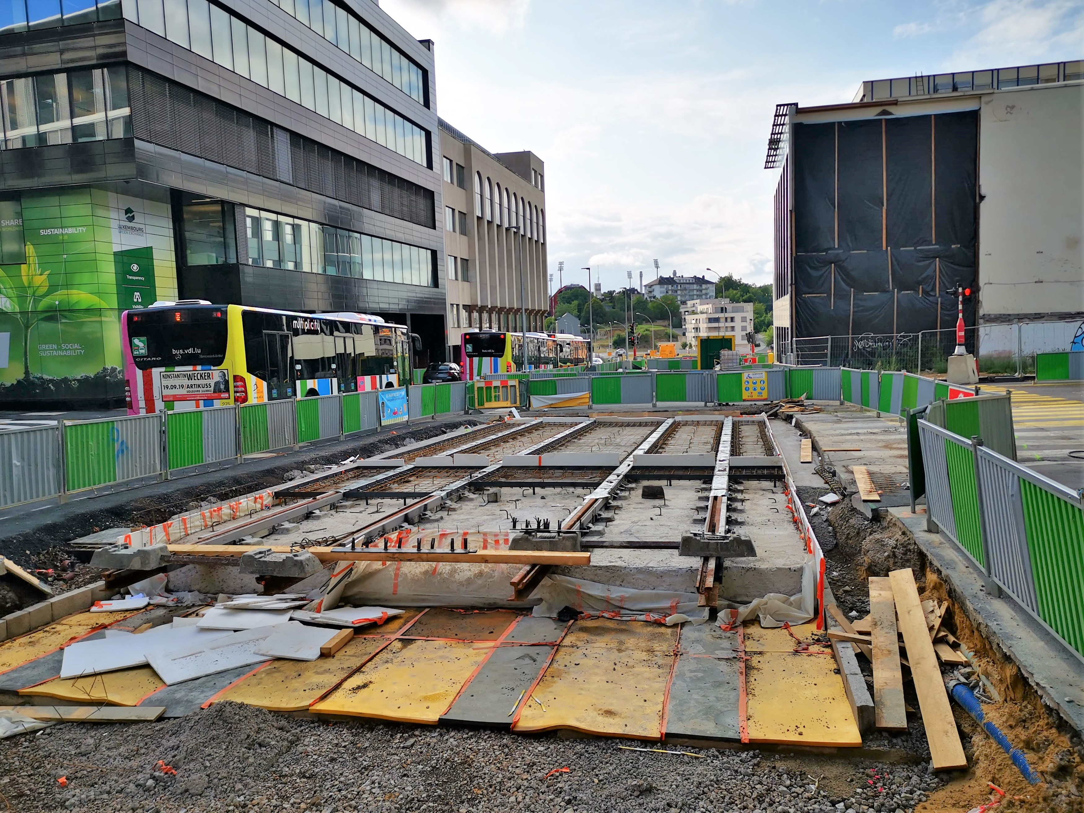 Luxembourg-ville: chantier du tram au croisement avenue Émile Reuter/boulevard Joseph II en direction de la place de l'Étoile.